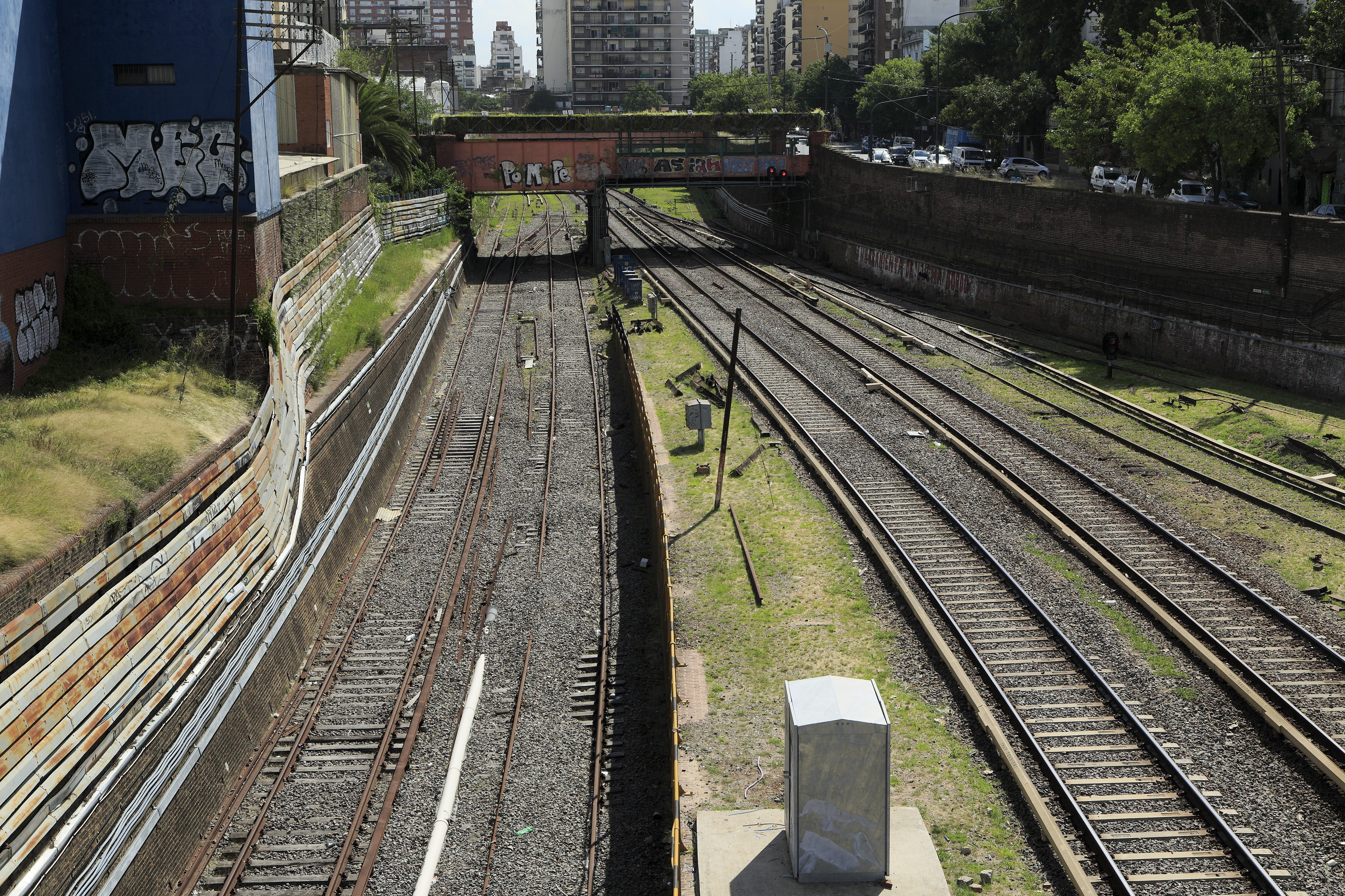 Von der Fußgängerbrücke im Zug der Calle Sánchez de Bustamente Richtung Westen, die beiden linken, südlichen Gleise der seit Caballito viergleisigen Strecke der Línea Sarmiento führen hier in den Tunnelbahnhof Plaza Miserere. Dort würden ideale Anschlüsse zur U-Bahn-Linie A bestehen, jedoch ist die Anbindung schon einige Jahre außer Betrieb. Trotzdem wurde schon Neumaterial eingebaut, beispielsweise in Form der beiden Weichen unter der Brücke.Die Brücke über den Gleisen gehört zur Calle Billinghurst. Das mit einer Stromschiene ausgerüstete Gleis ganz rechts ist die Verbindung von den Fernbahnsteigen.